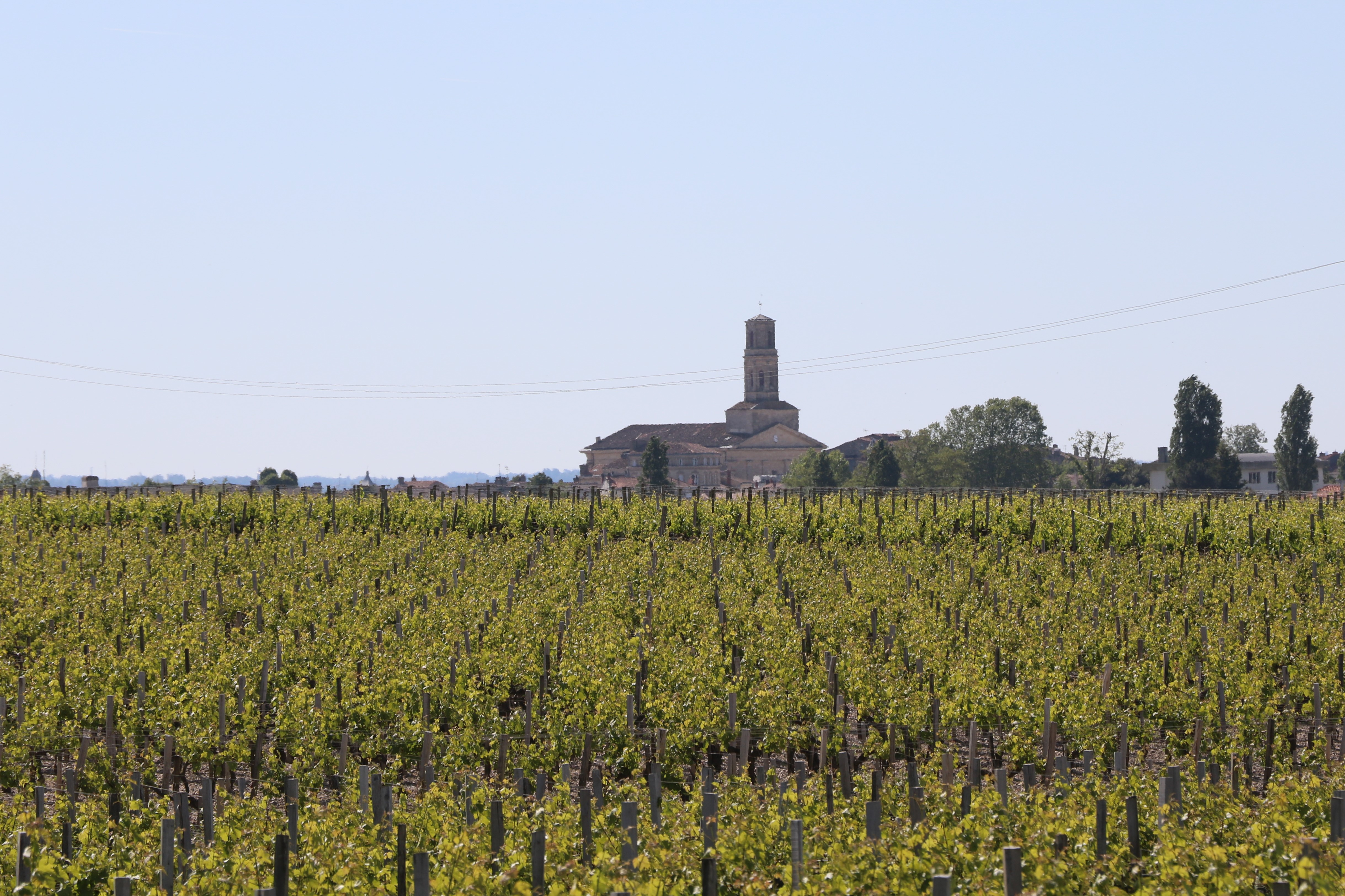 Vignoble depuis la RD 205 avec l'église Saint-Martin à l'arrière-plan